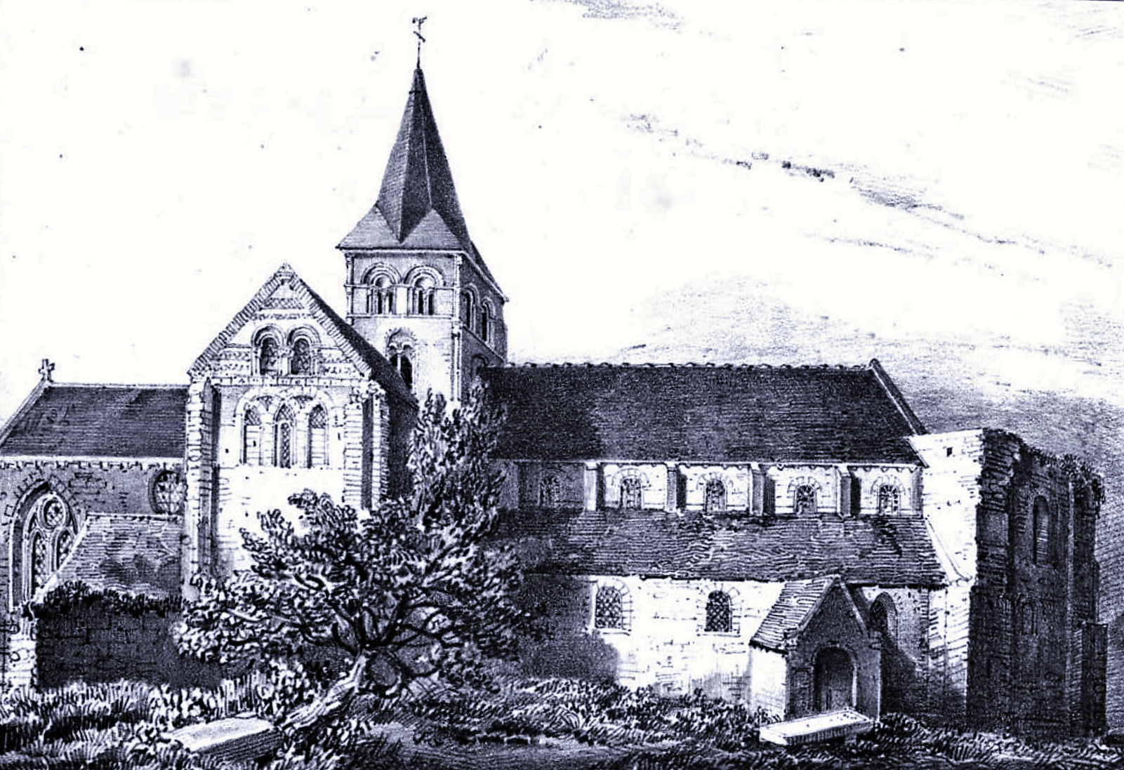 Abbaye de Graville (76), Vue vers 1820 (image du domaine public, Langlois, modifiée)